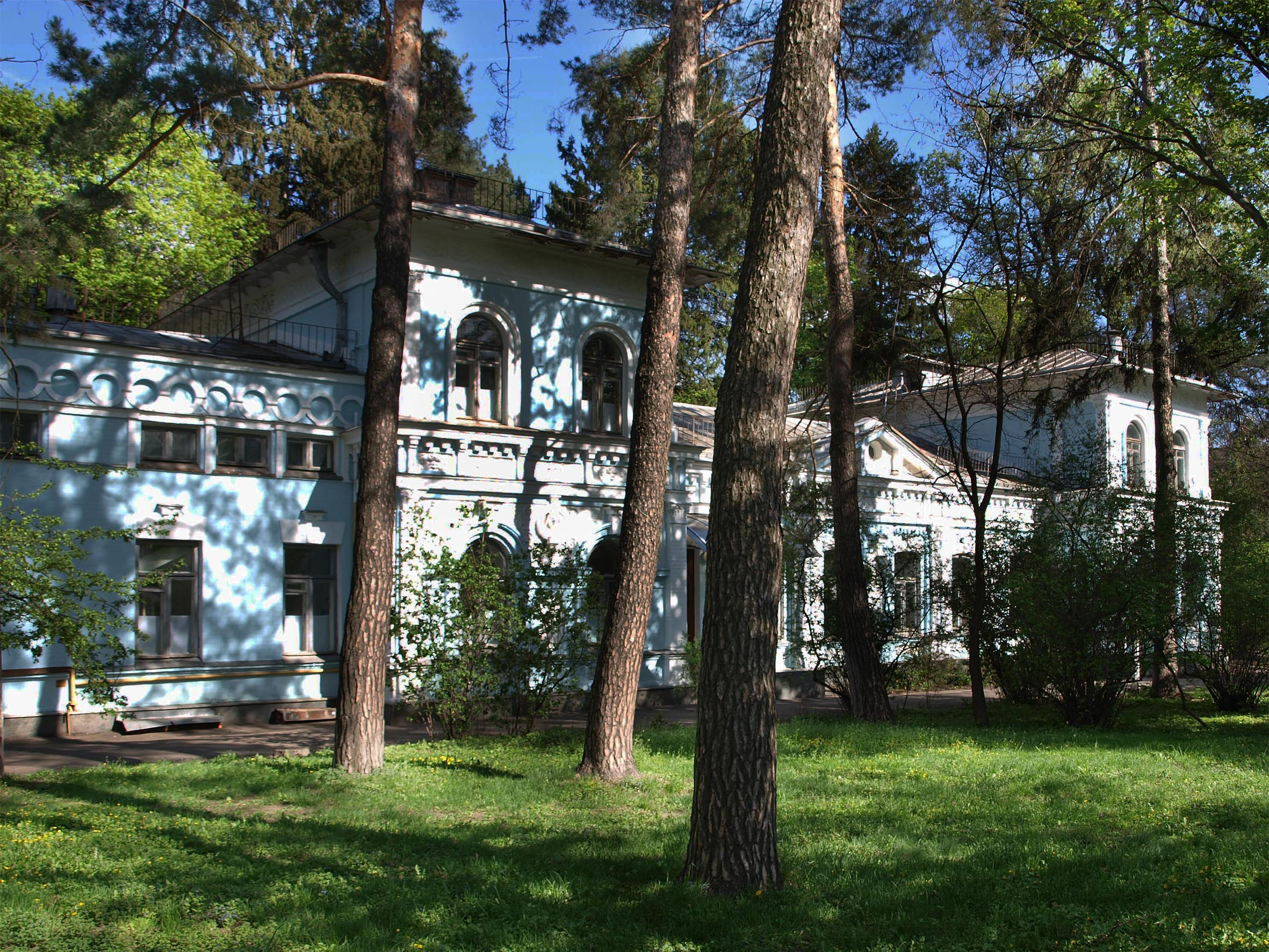 Садиба О. Більського, в якій проживали радянські діячі, містився Київський НДІ педіатрії, акушерства та гінекології МОЗ УРСР, Київ, Герцена вул., 14. Відома в народі як "Дача Хрущова".